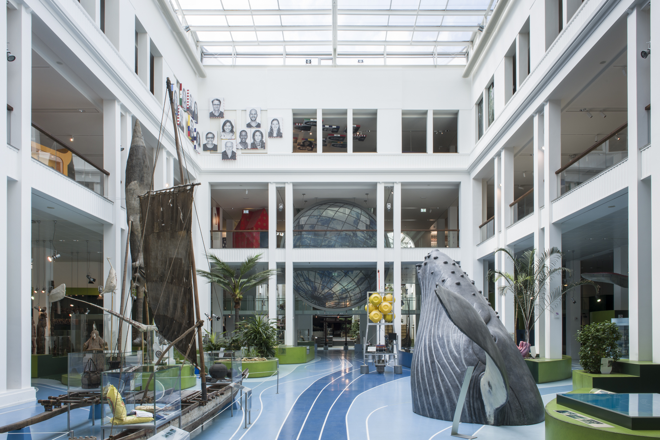 Innenhof Ozanien 2019